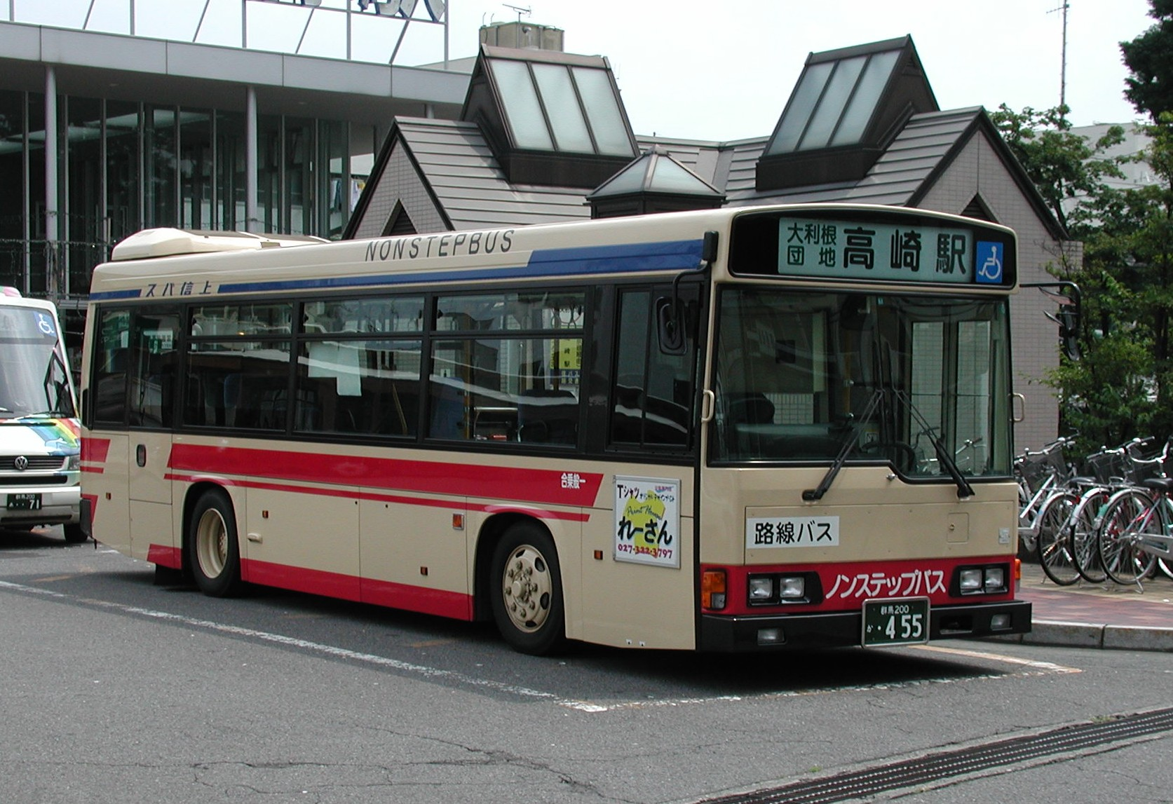 上信バス 中央前橋駅前 この画像は登録者Tokyodesert自身が撮影したものである。この画像についてパブリックドメインとして提供する。